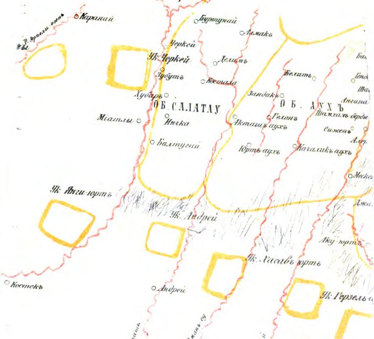 Оку-Юрт на карте